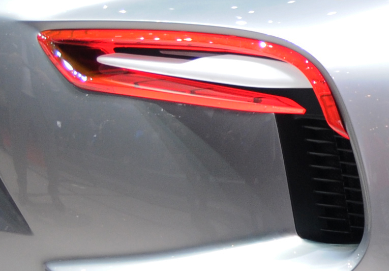 Faro posteriore full LED della Maserati Alfieri Concept del 2014